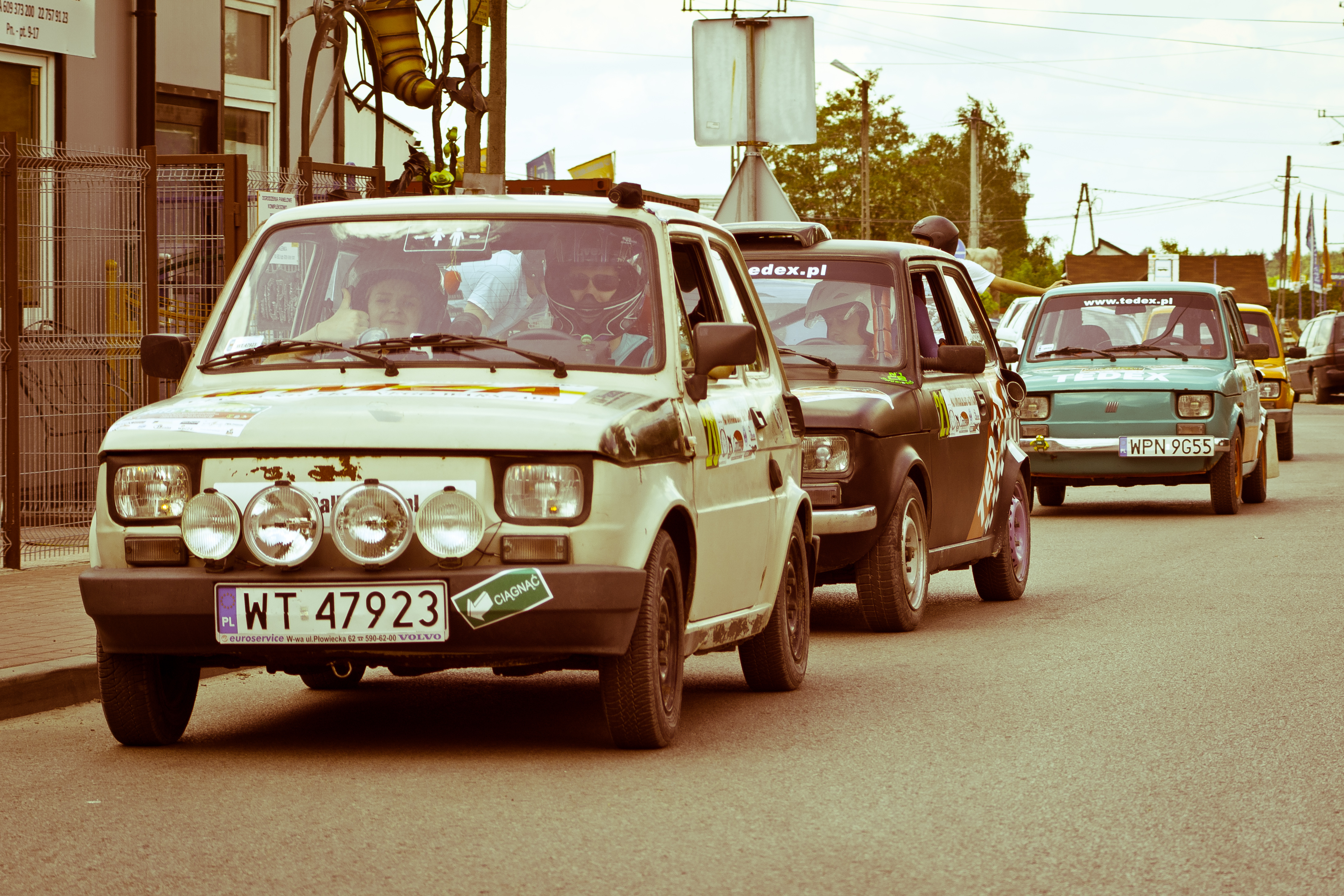 Rajd VII Rally Piaseczno 2012, OS Lesznowola, samochody oczekują na wjazd na start odcinka. Na pierwszym planie Fiat 126p, nr startowy 20, kierowca Piotr Bogucki, pilot Katarzyna Kłos.